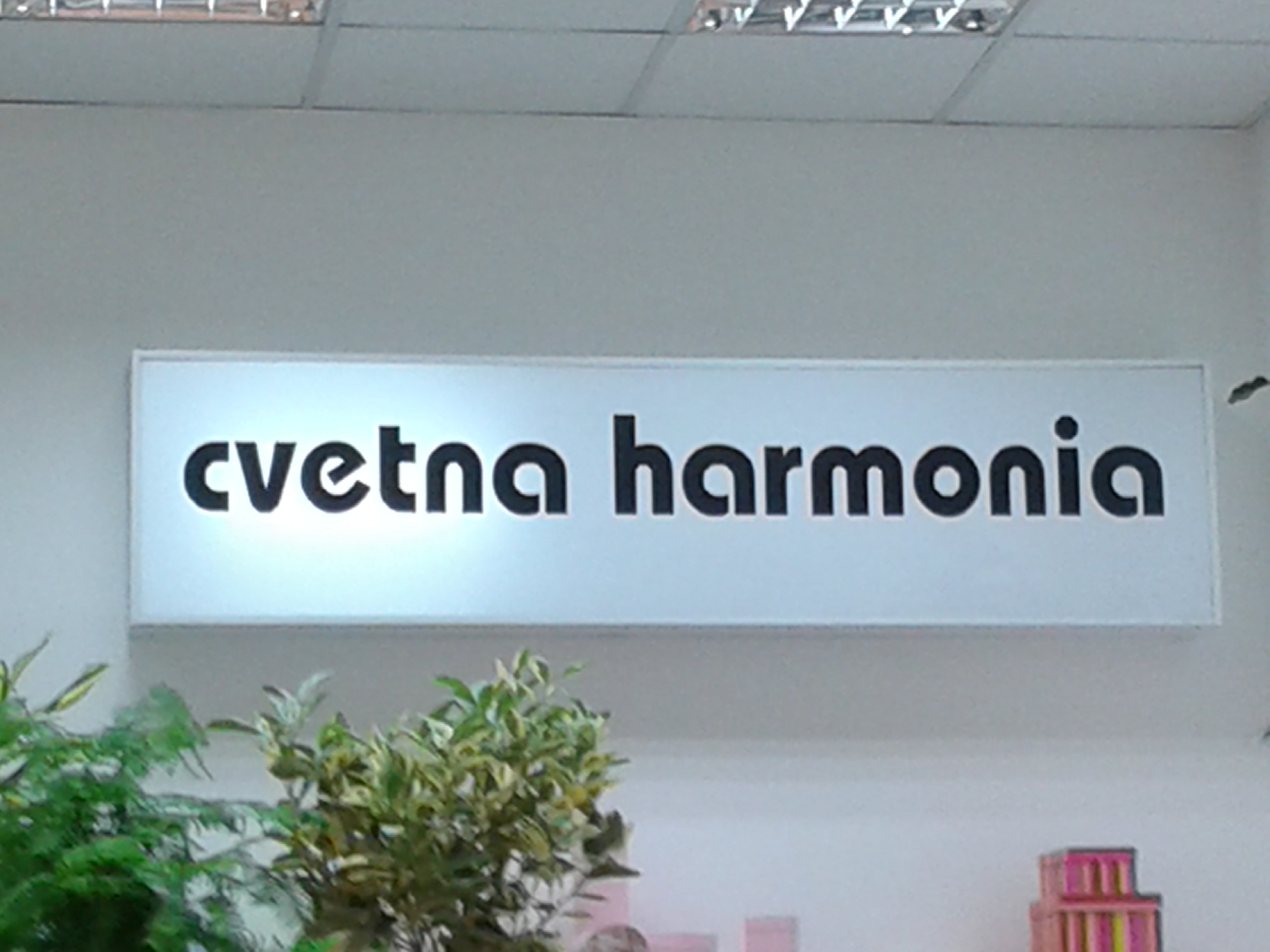 Име на магазин за цветя на шльковица.